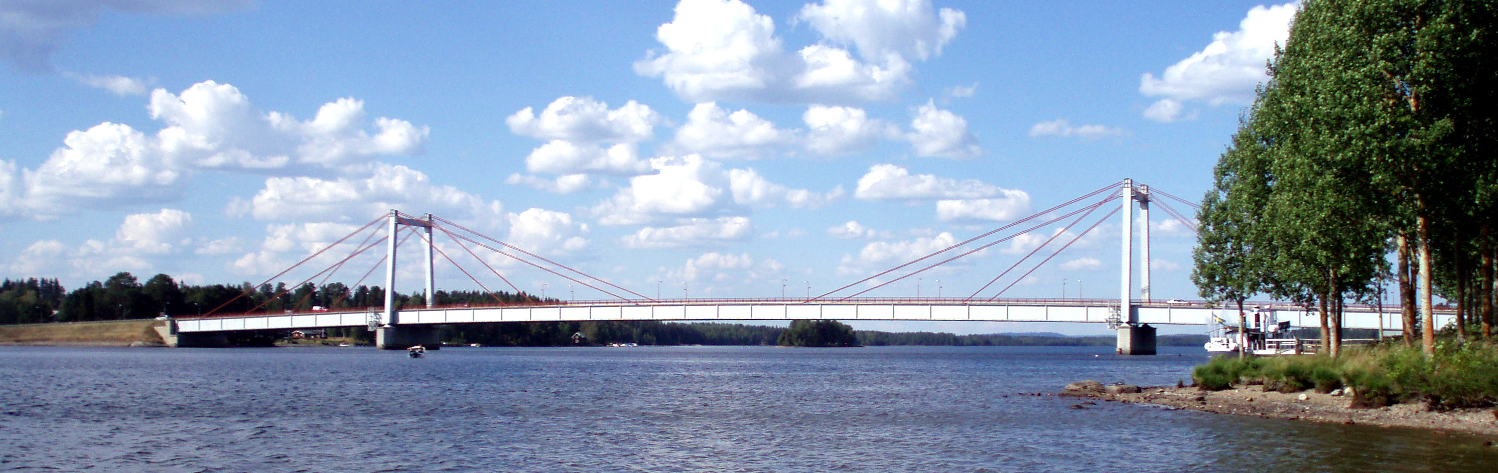 Stromsundbréck